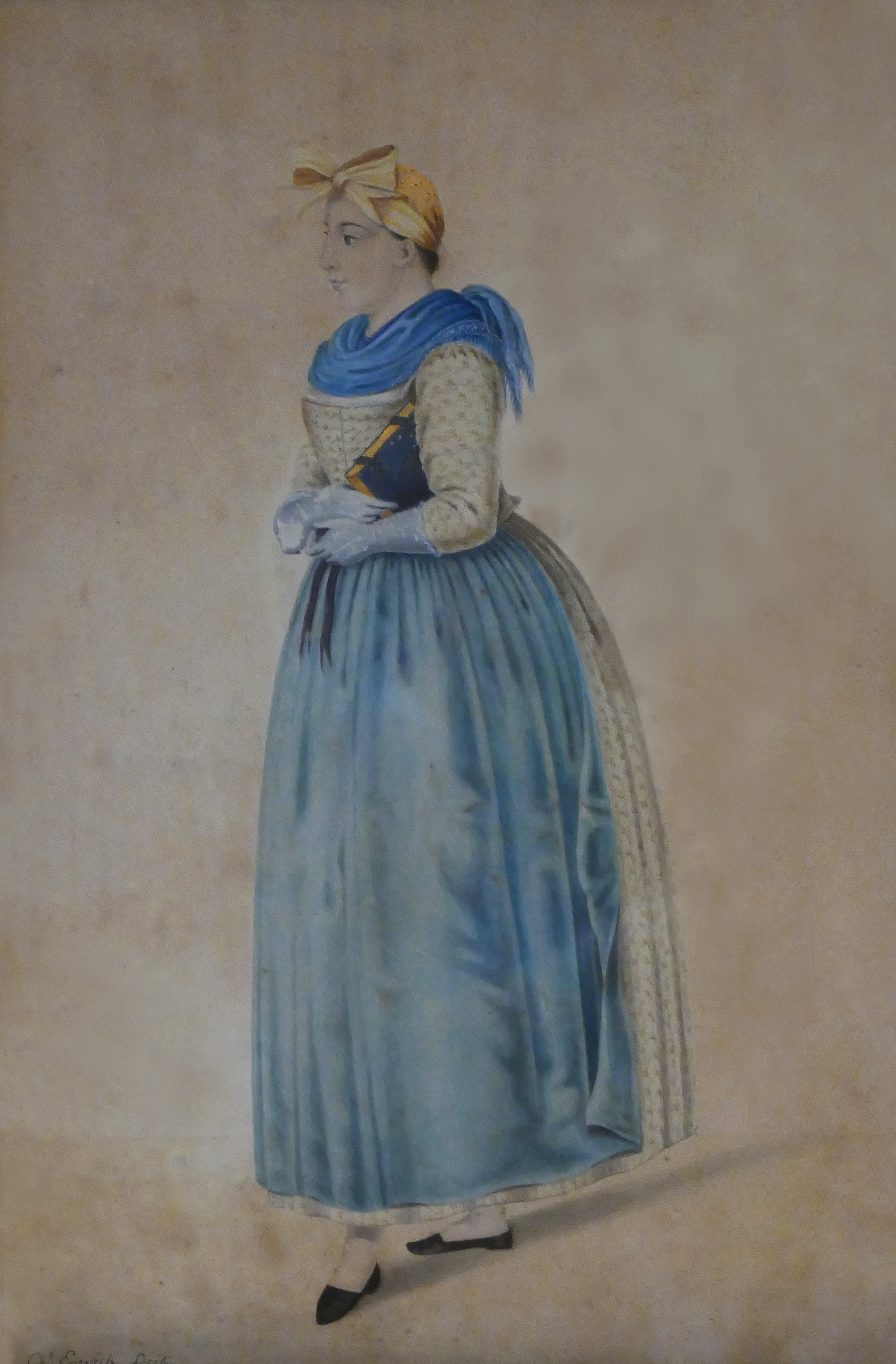 Charles Emrich, Paysanne du Kochersberg, 1830. Aquarelle sur papier. Collections du Musée alsacien de Strasbourg. Exposition temporaire Costumes d'Alsace, étoffes d'un monde au Musée alsacien de Strasbourg (2018).